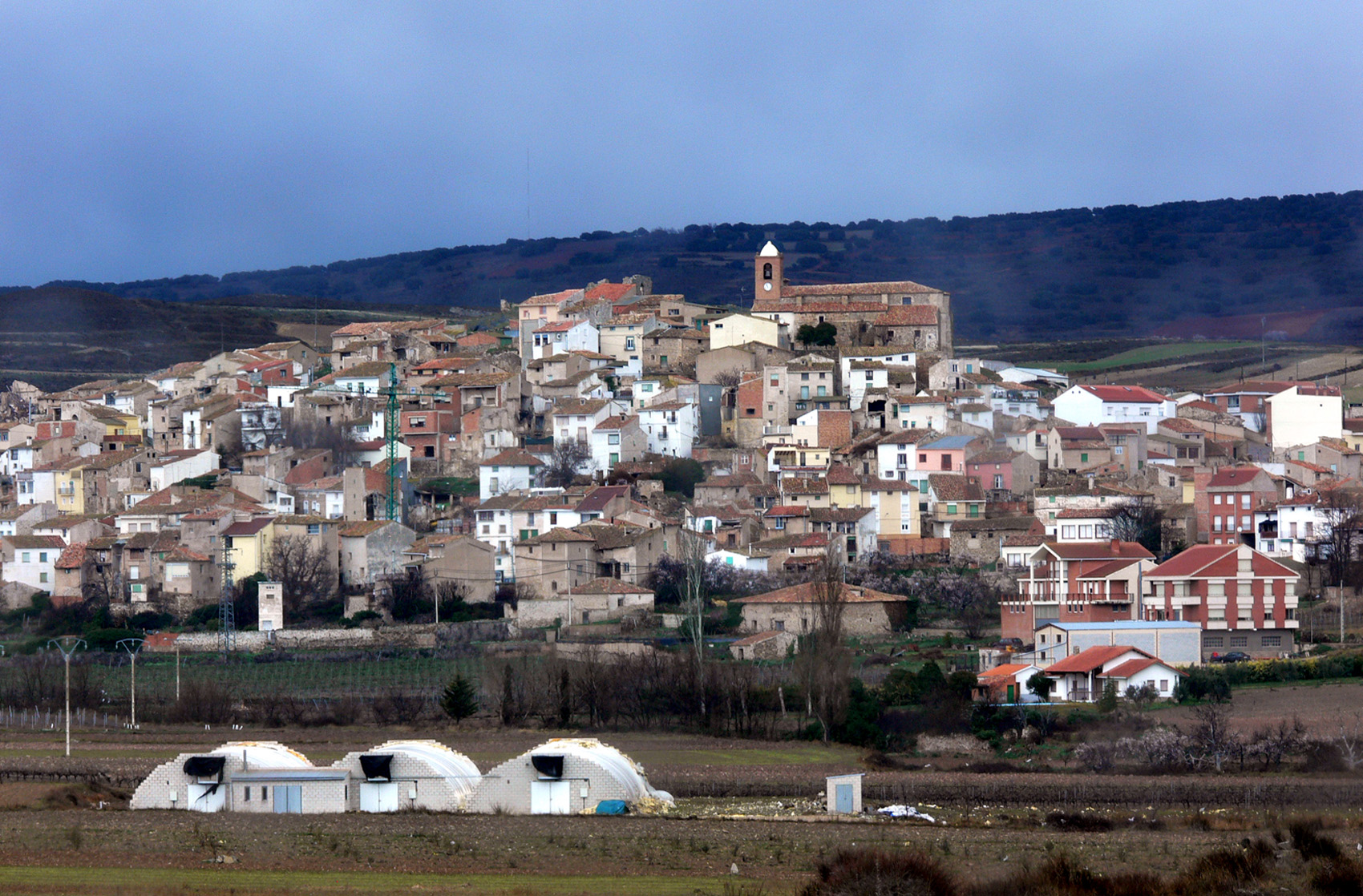 Grávalos, La Rioja - España.